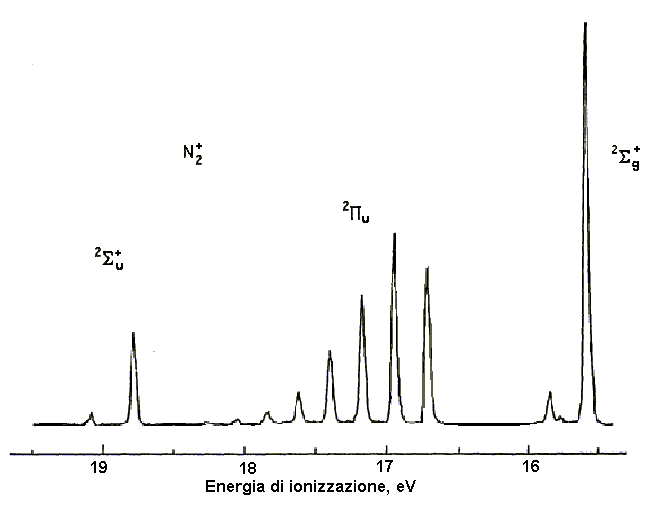 spettro UPS dell'azoto molecolare Ho modificato l'immagine precedente sostituendo l'etichetta per l'ascissa e aumentando la definizione (con noiosissime modifiche pixel per pixel).